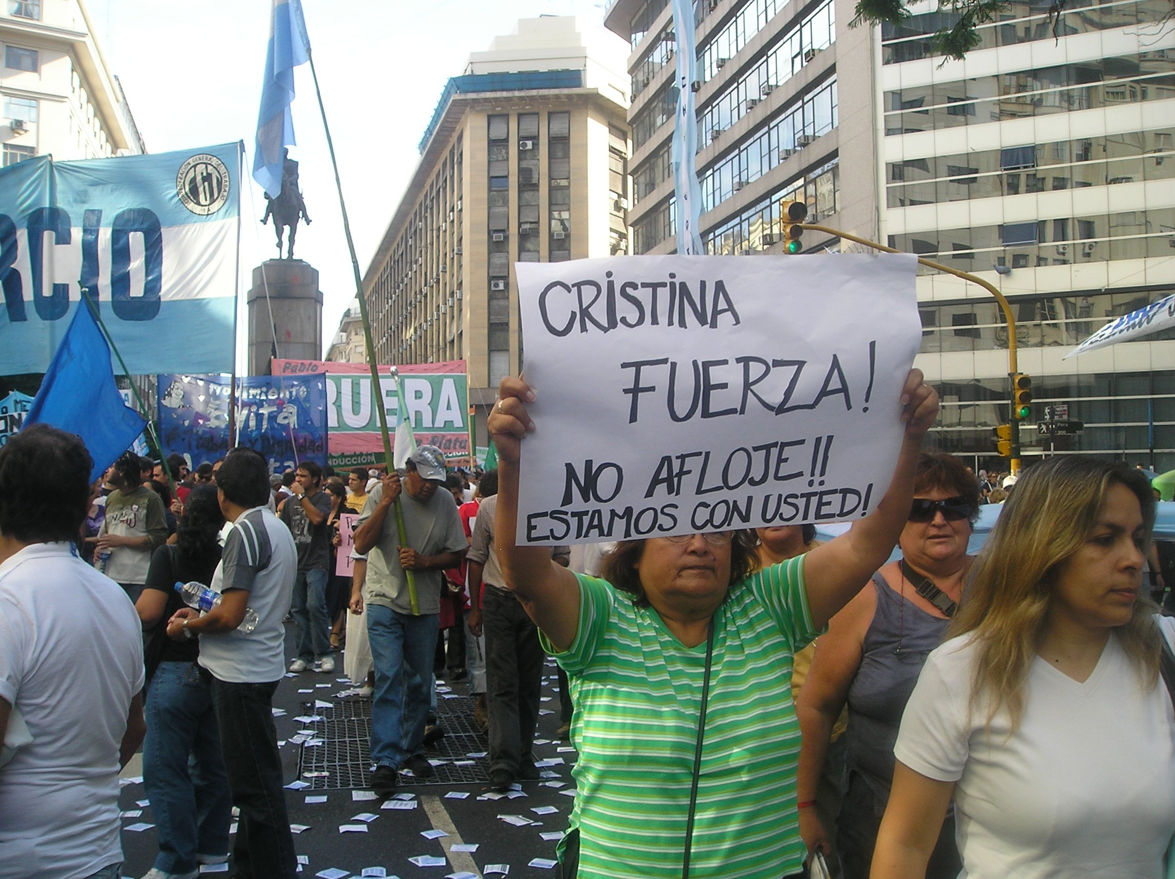 Marcha de apoyo a Cristina. Paro agropecuario. Plaza de Mayo. Buenos Aires